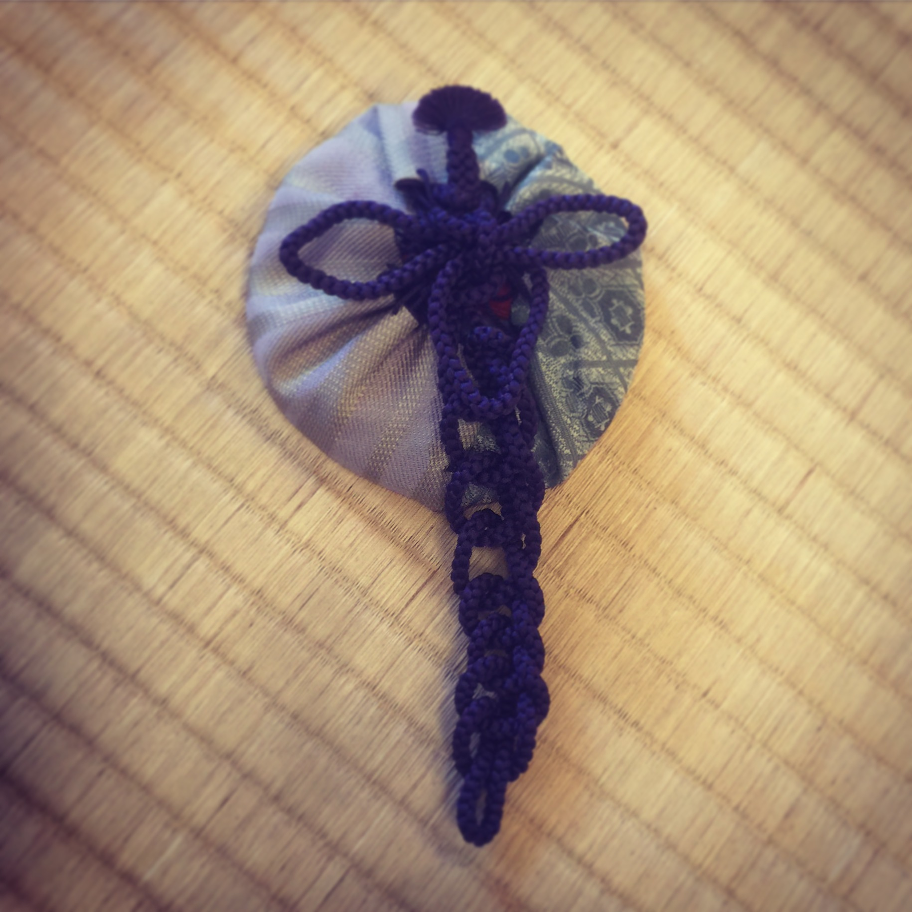 志野袋花結びの表三月を表す藤の結び